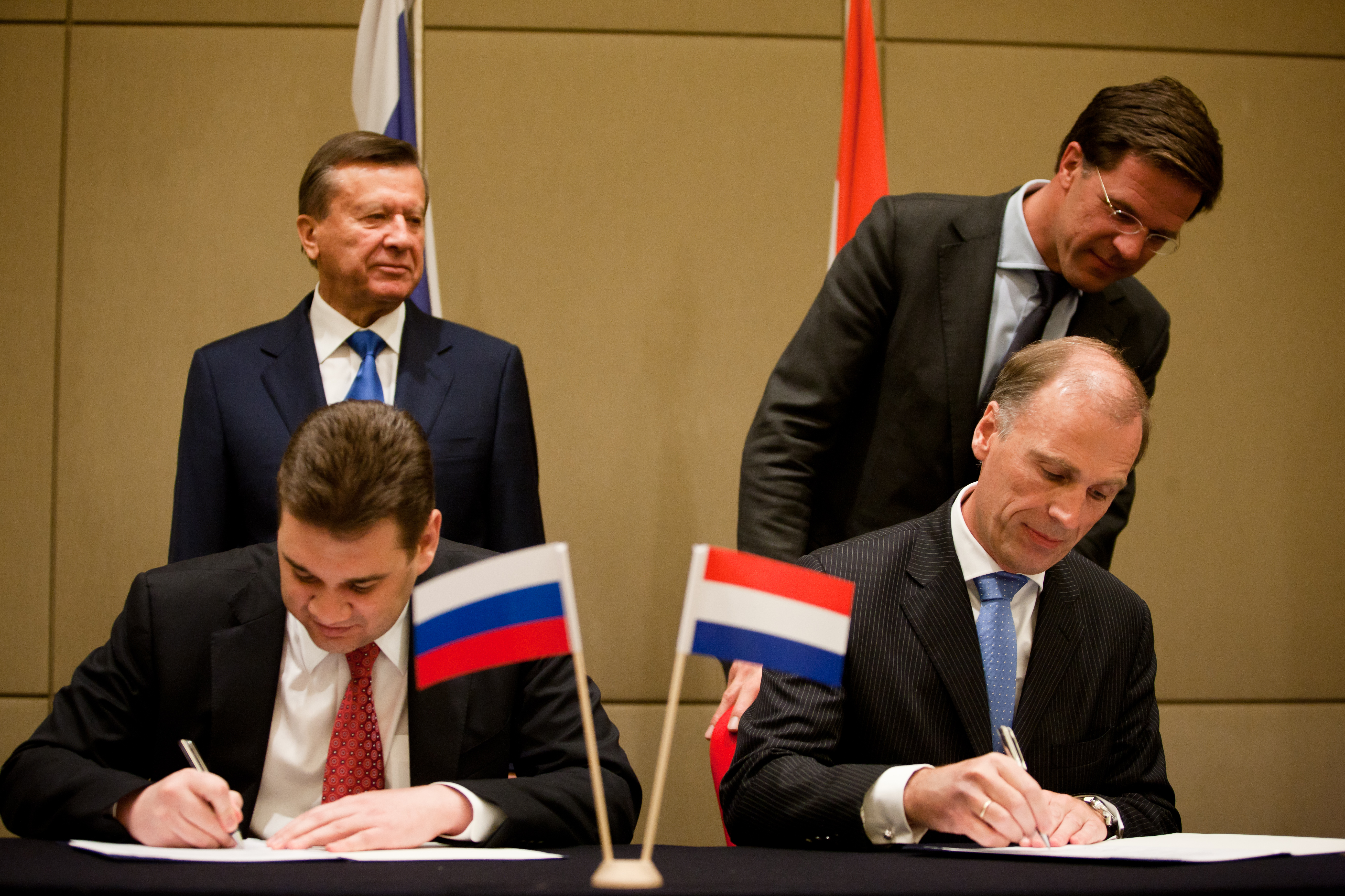 Op de tweede dag van de economische missie naar Rusland openen minister-president Rutte en vice-premier Zoebkov van Rusland diverse seminars en rondetafelbijeenkomsten voor Nederlandse en Russische bedrijven. Deze richten zich op Energie, Biomassa, Gezondheidszorg, Luchthavens en Binnenvaart. Er worden diverse contracten en overeenkomsten tussen bedrijven ondertekend. Lees meer